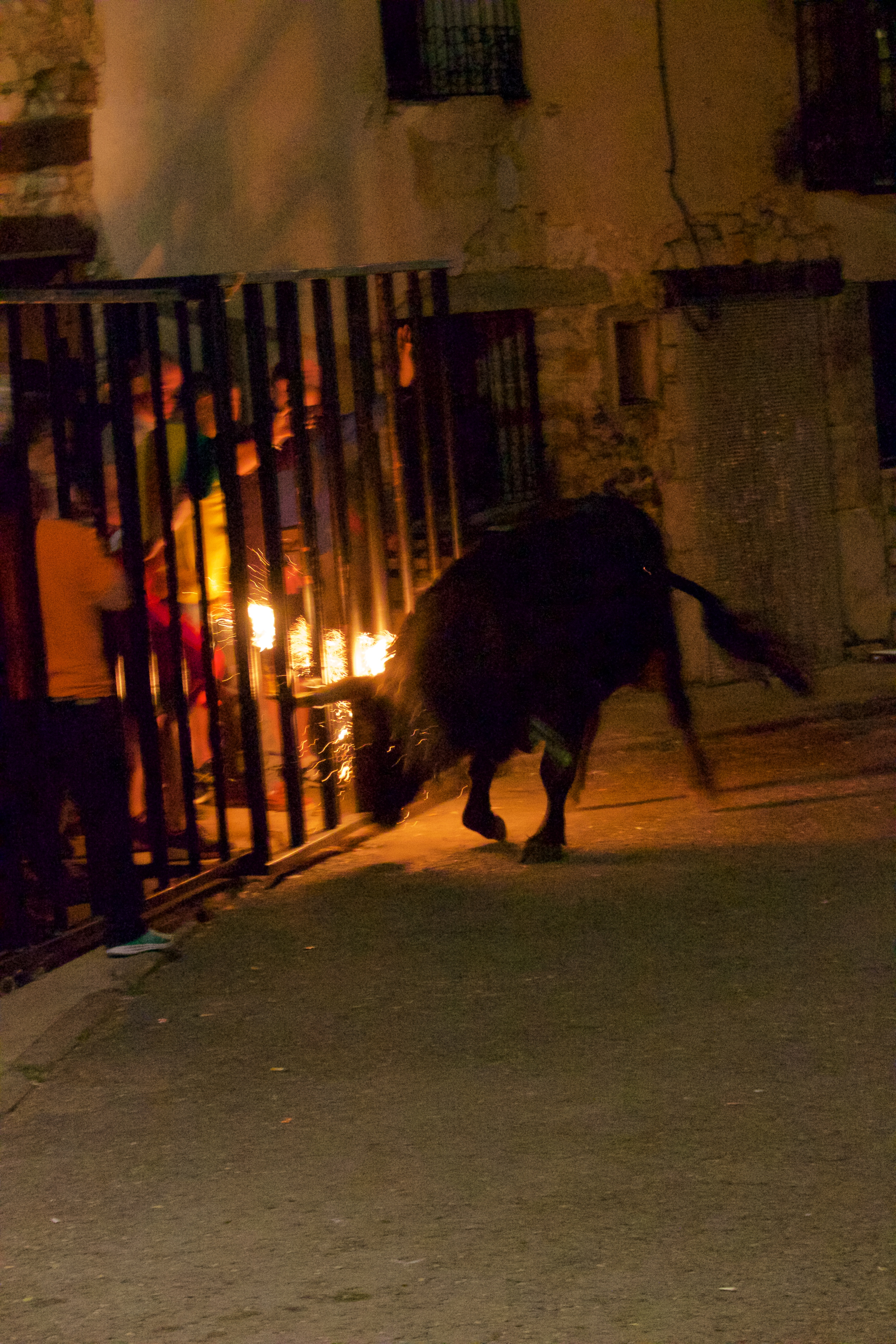 Fortanete #Maestrazgo #Teruel